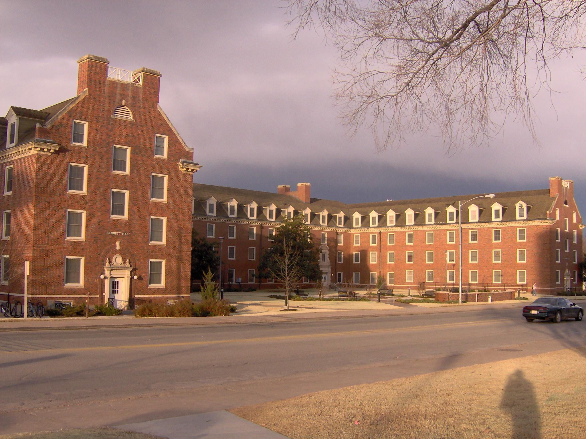 Bennett Hall- Luxury apartments